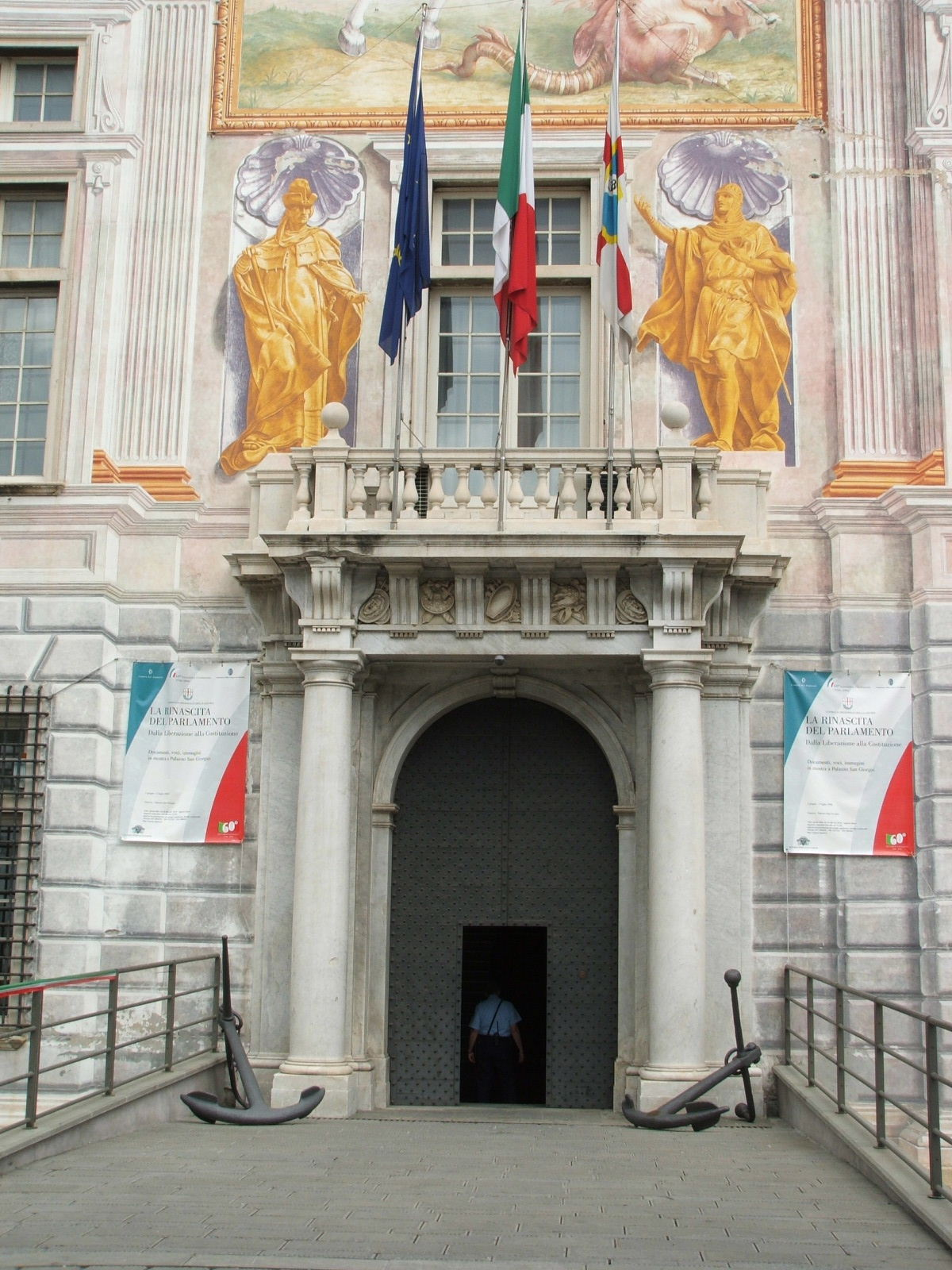 Palazzo San Giorgio (Genova), particolare del prospetto principale